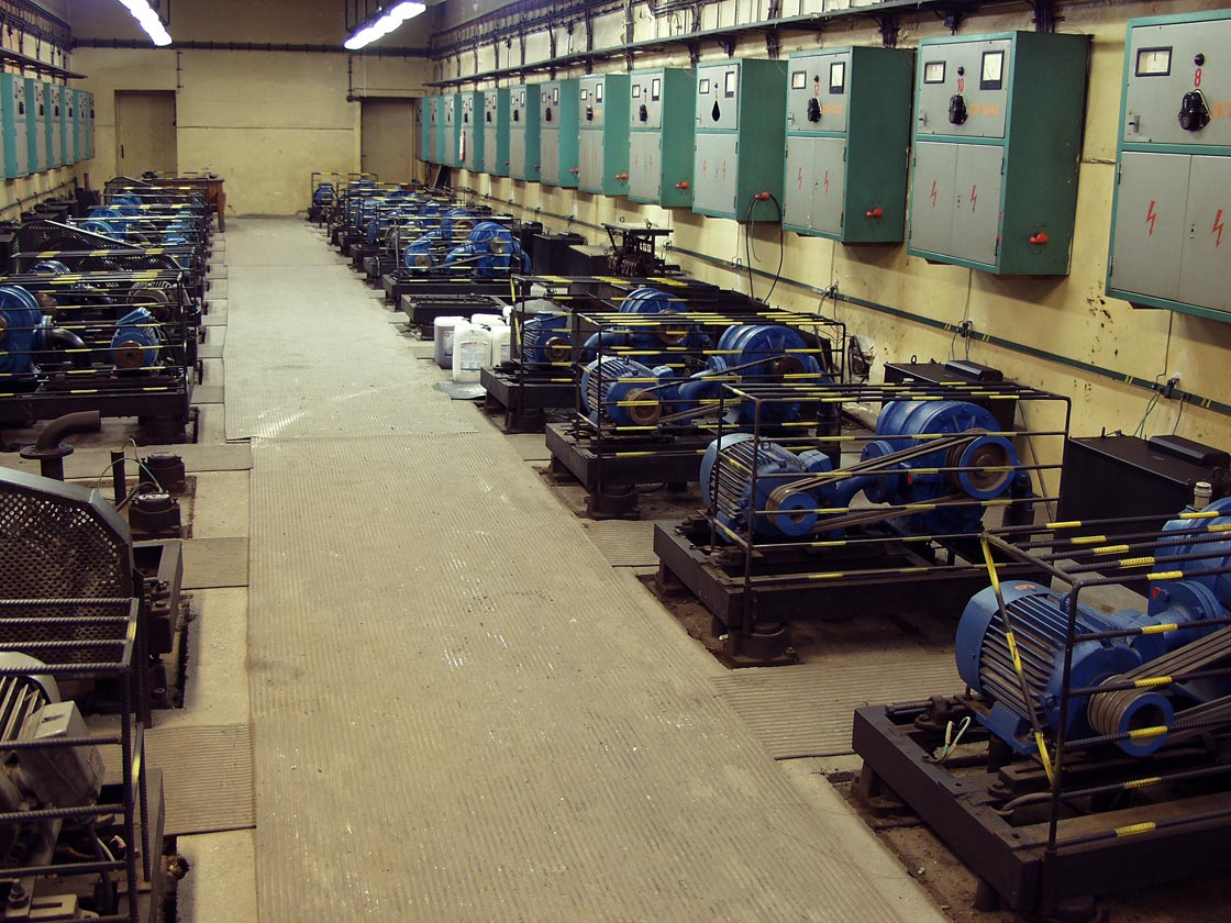 Strojovna pražské potrubní pošty v JIndřišské ulici Hornjoserbsce: Tutón wobraz pokazuje mašinarnju Praskeho rołoweho pósta z dujadłami